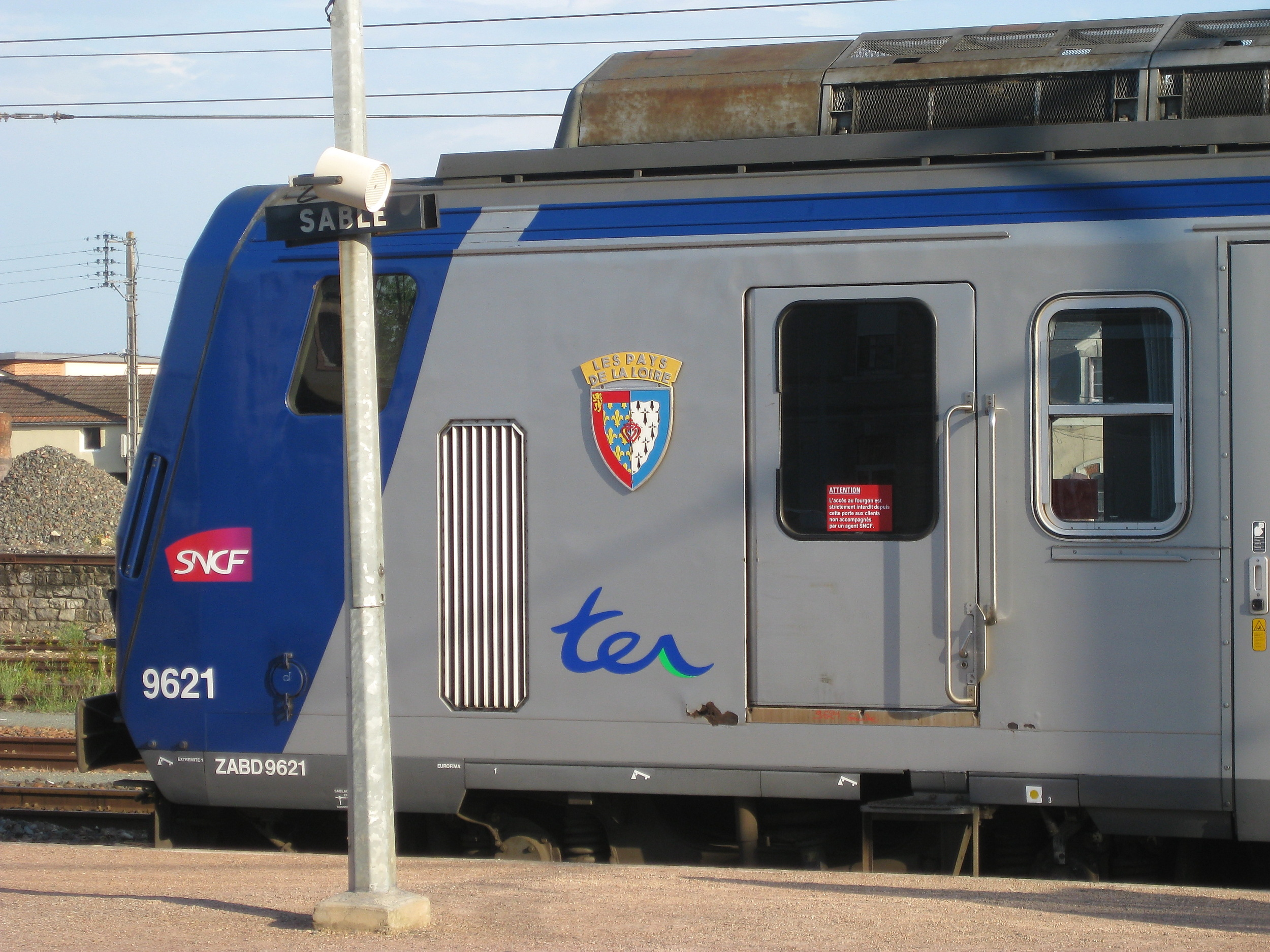 La Z9621 sur la voie d'évitement de la gare de Sablé en Sarthe. On peut y observer un blason de la région des Pays de la Loire.